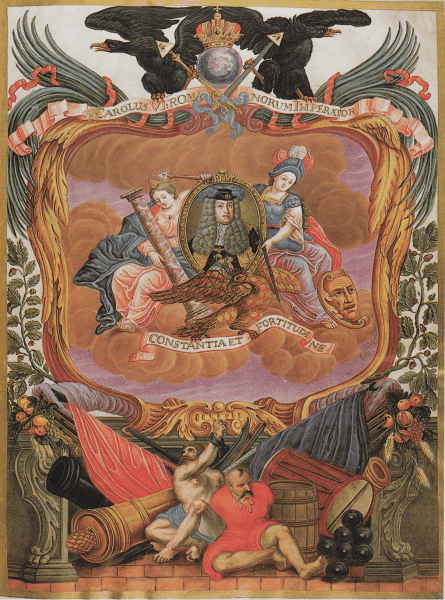 Portrét císaře Karla VI. s jeho devízou. Kniha erbů. Stavovské rukopisy. Moravský zemský archív